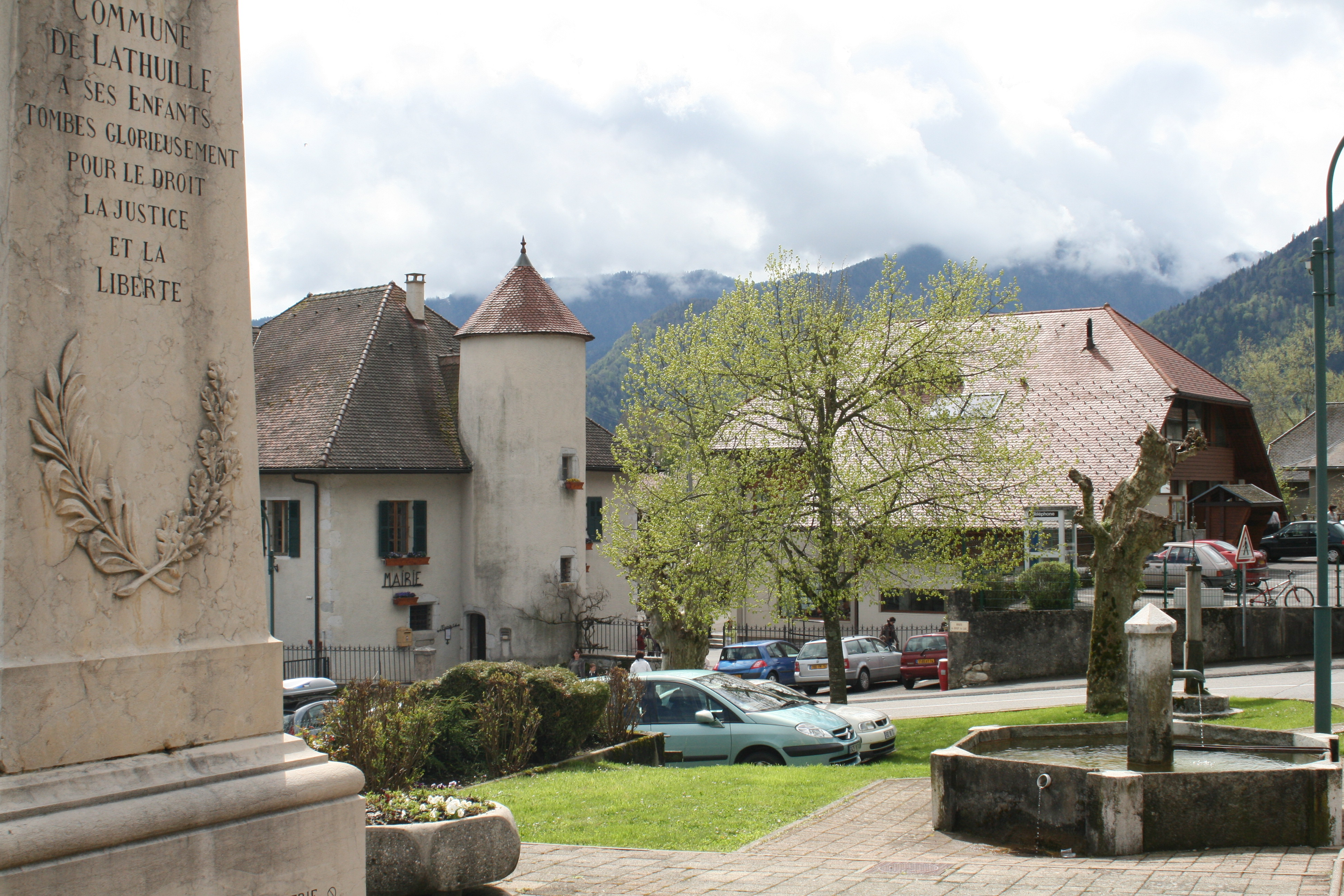 Mairie-école, école maternelle et monument aux Morts de Lathuile (ne pas confondre avec l'ancien château de Lathuile aujourd'hui en ruines)